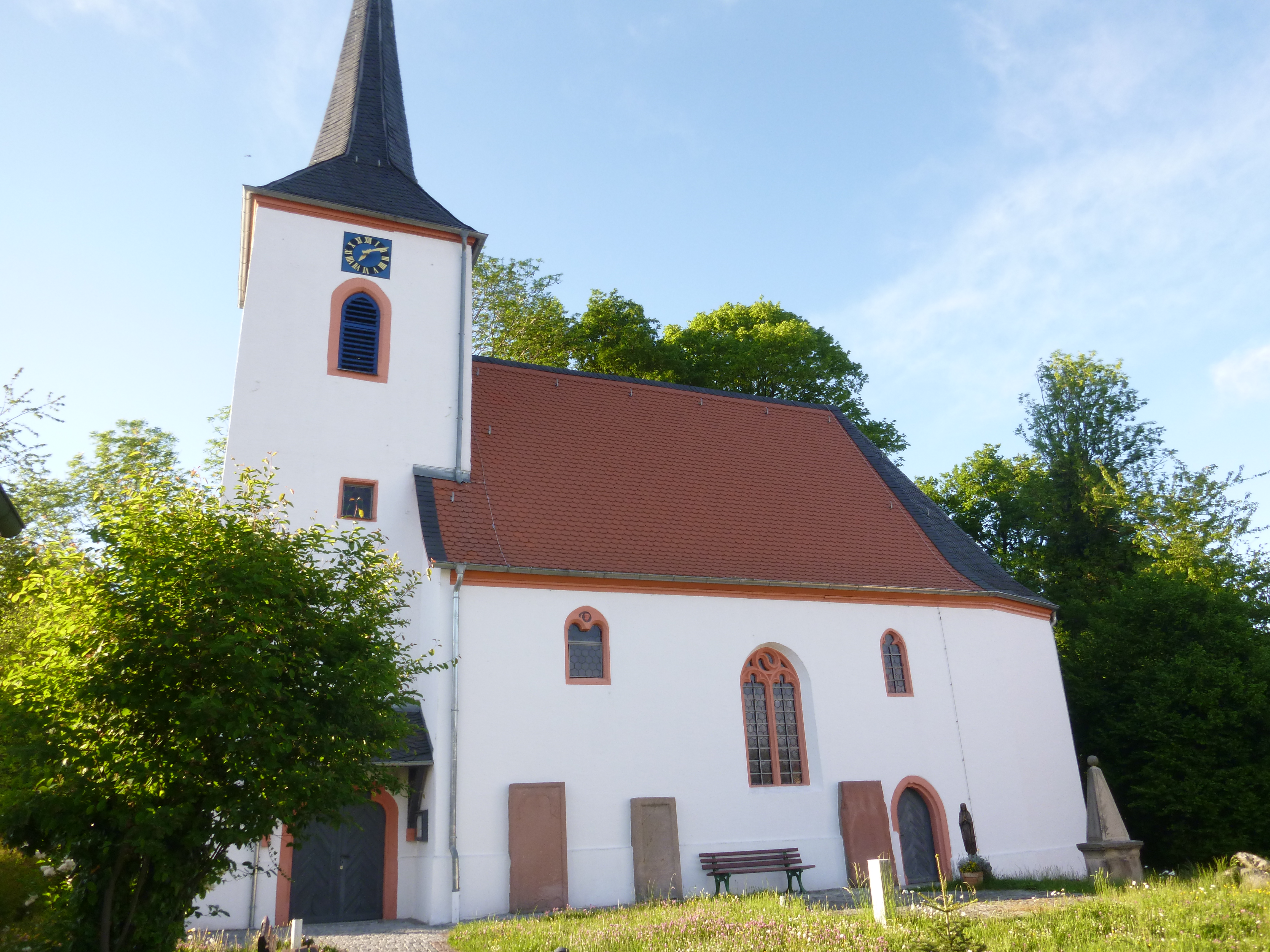 Kirko de Beedenkirchen, parto de la komunumo Lautertal en Hesio, Germanio